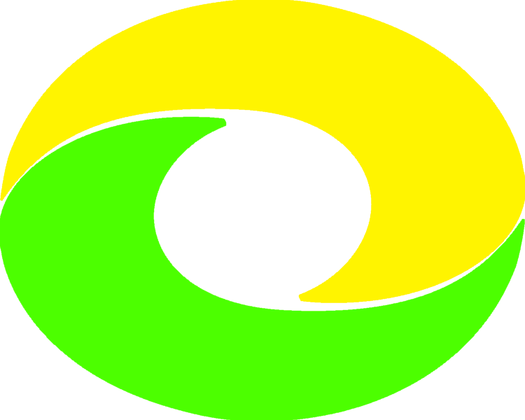 No Se Que Decir